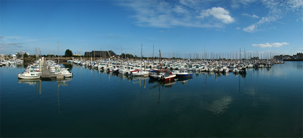 Saint-Vaast-la-Hougue, Manche, Normandie, France.